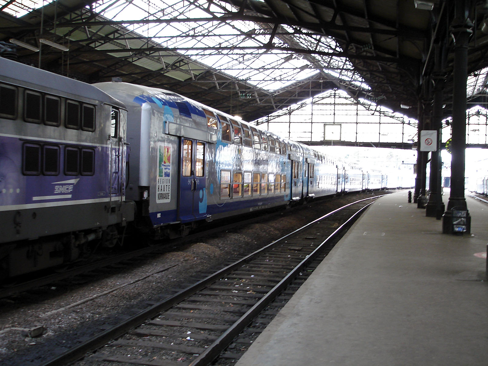 BB 817056 et VO 2N en gare de Paris-Saint-Lazare, France.